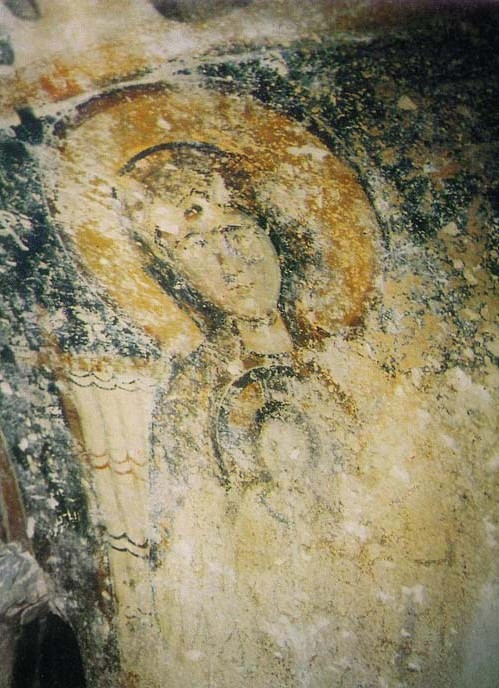 صورة جدارية